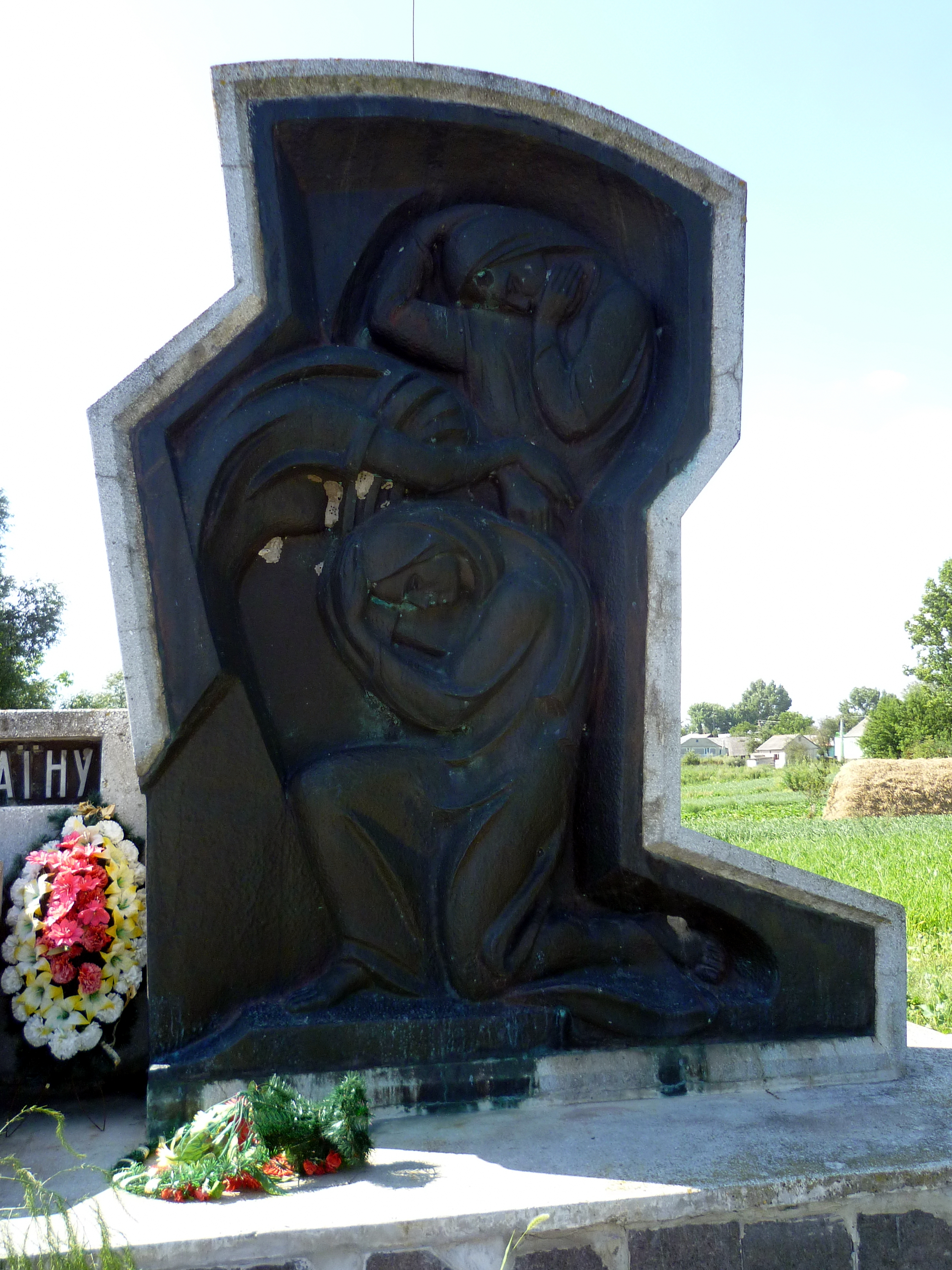 Пам’ятник односельчанам, полеглим за Україну в роки ІІ світової війни (1997 рік) - барельєф - с.Терешківці (біля церкви) Горохівський район Волинська область Україна